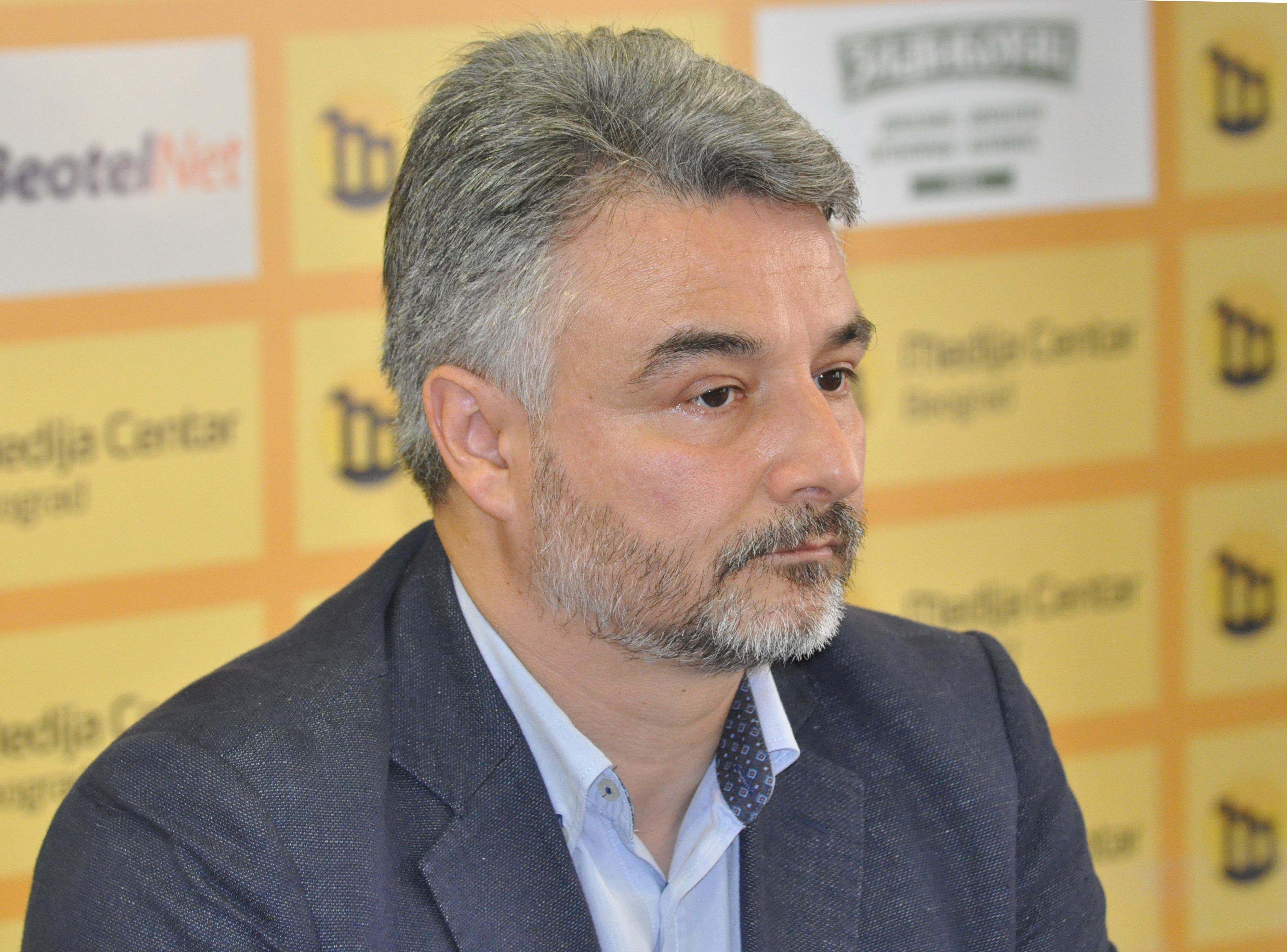 Владан Глишић, Представљање пратформе за заједничко дјеловање народњачки оријентисаних политичких групација